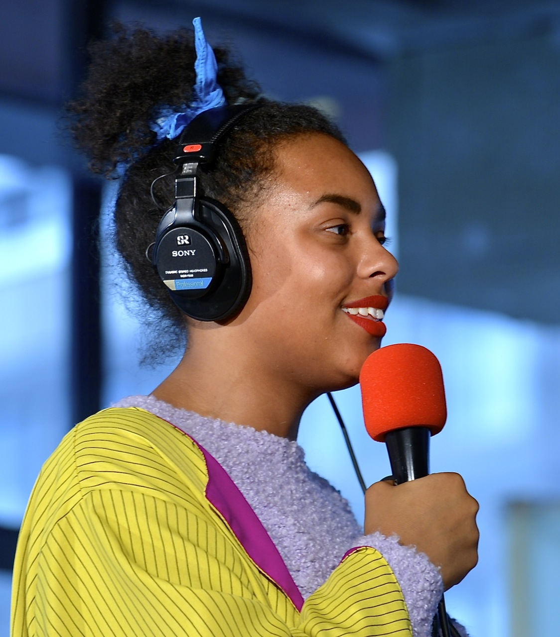 Amie Bramme Sey intervjuar Gunilla C Carlsson (S) och kulturminister Lena Adelsohn Liljeroth (M) om kulturpolitik i Kulturvalet i P1 på Kulturhuset i Stockholm den 8 september 2014.